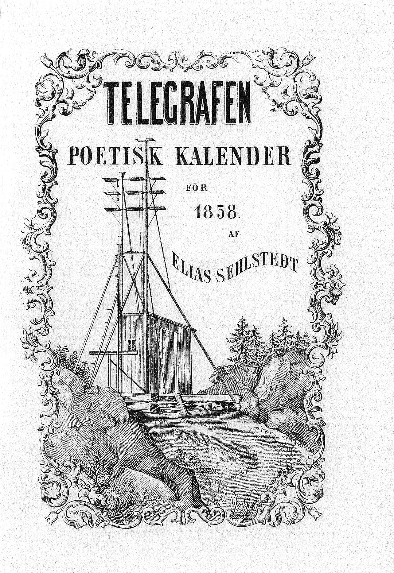 Telegrafen Poetisk kalender för 1858 av Elias Sehsltedt, utgiven hos J Beckman Stockholm 1857